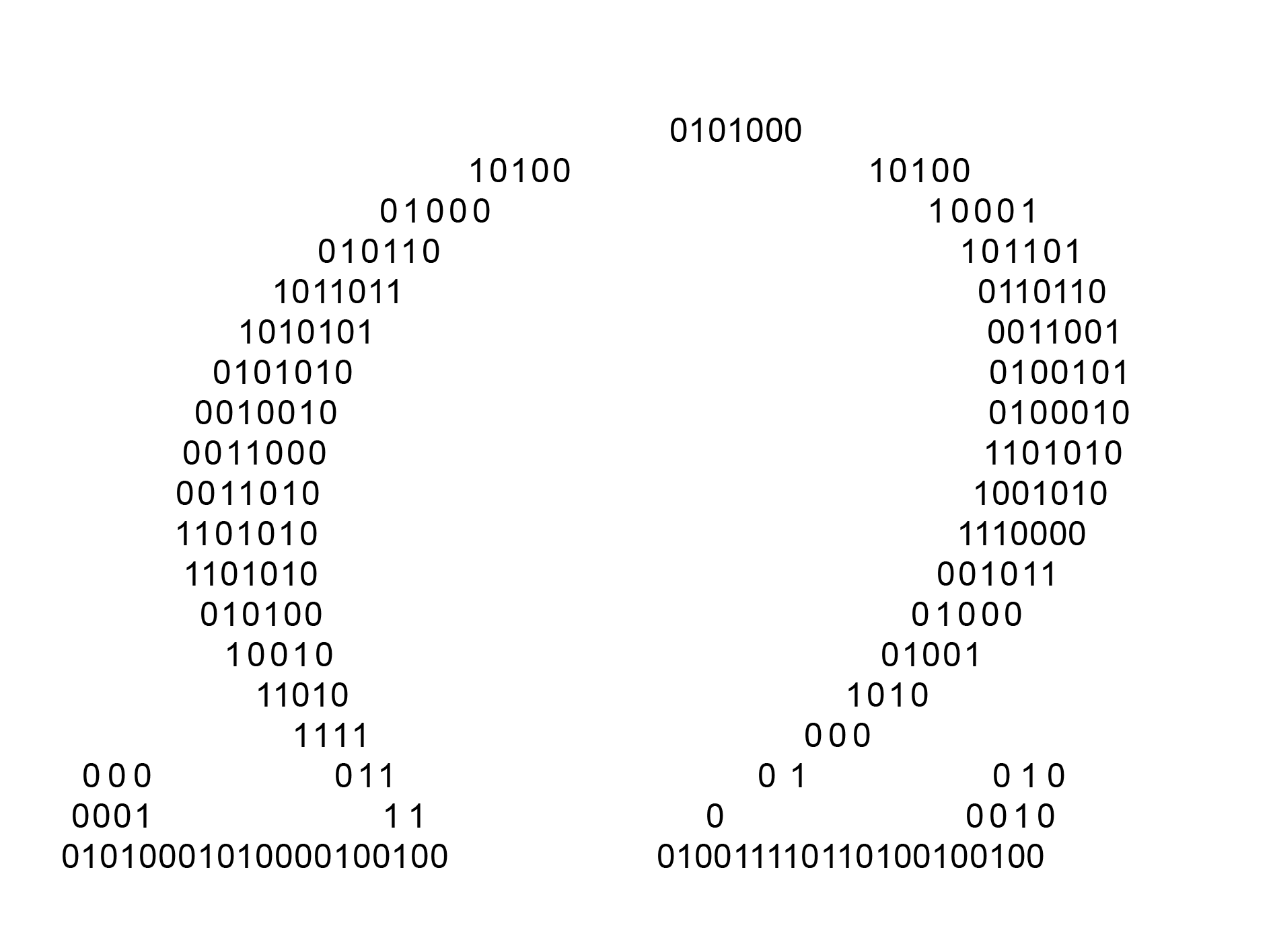 Une métaphore de l'Oméga de Chaitin